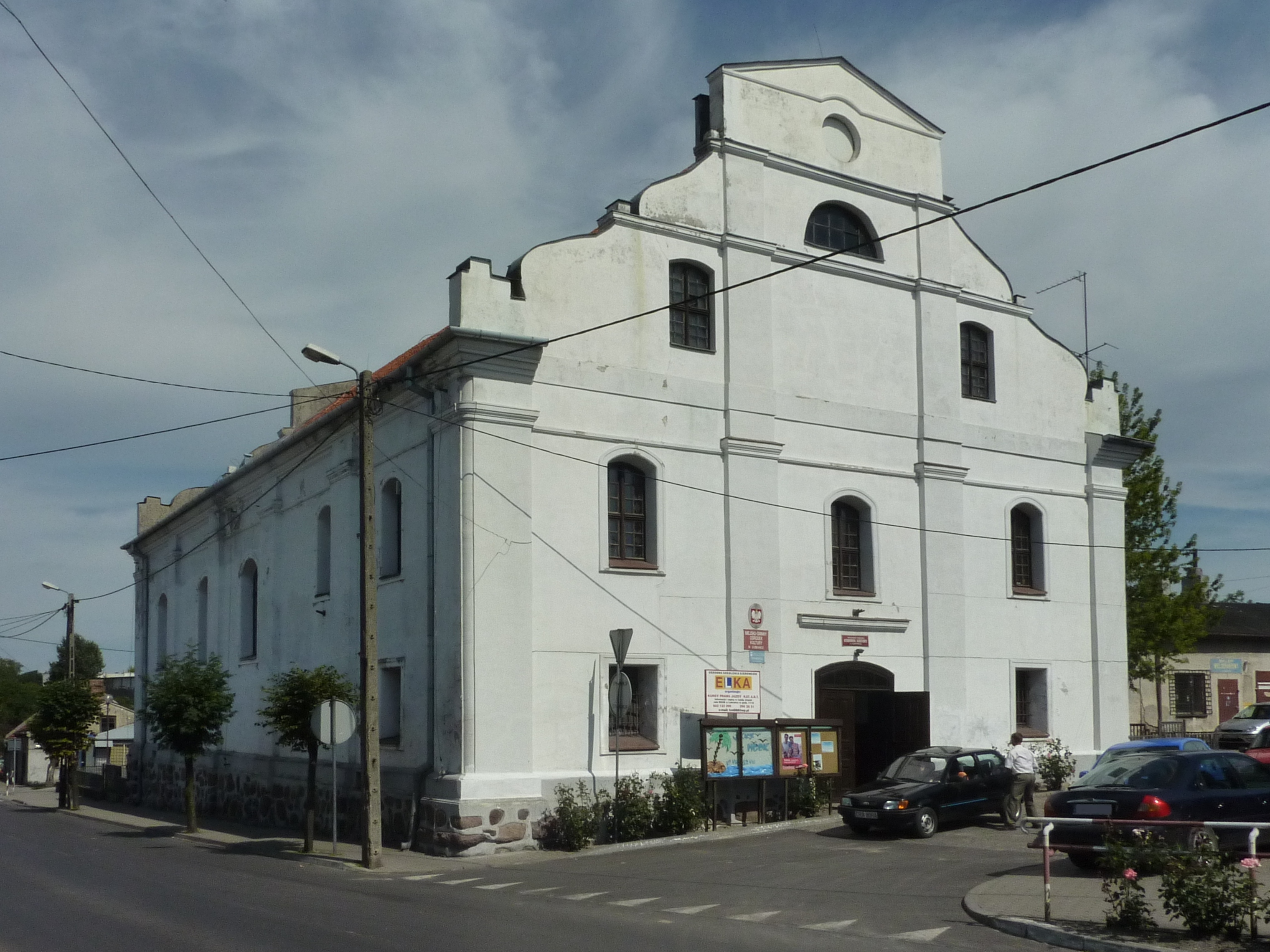 Synagoga w Lubrańcu, obecnie Miejsko-Gminny Ośrodek Kultury.